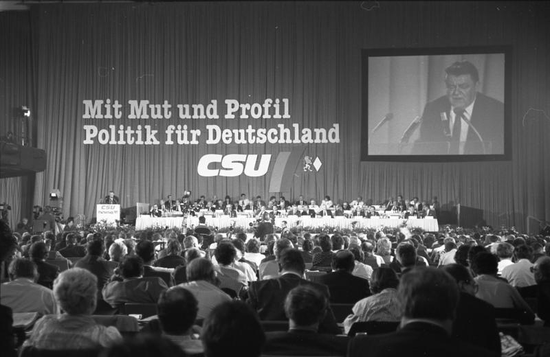 22.11.1987 51. CSU-Parteitag in der Bayernhalle in München.